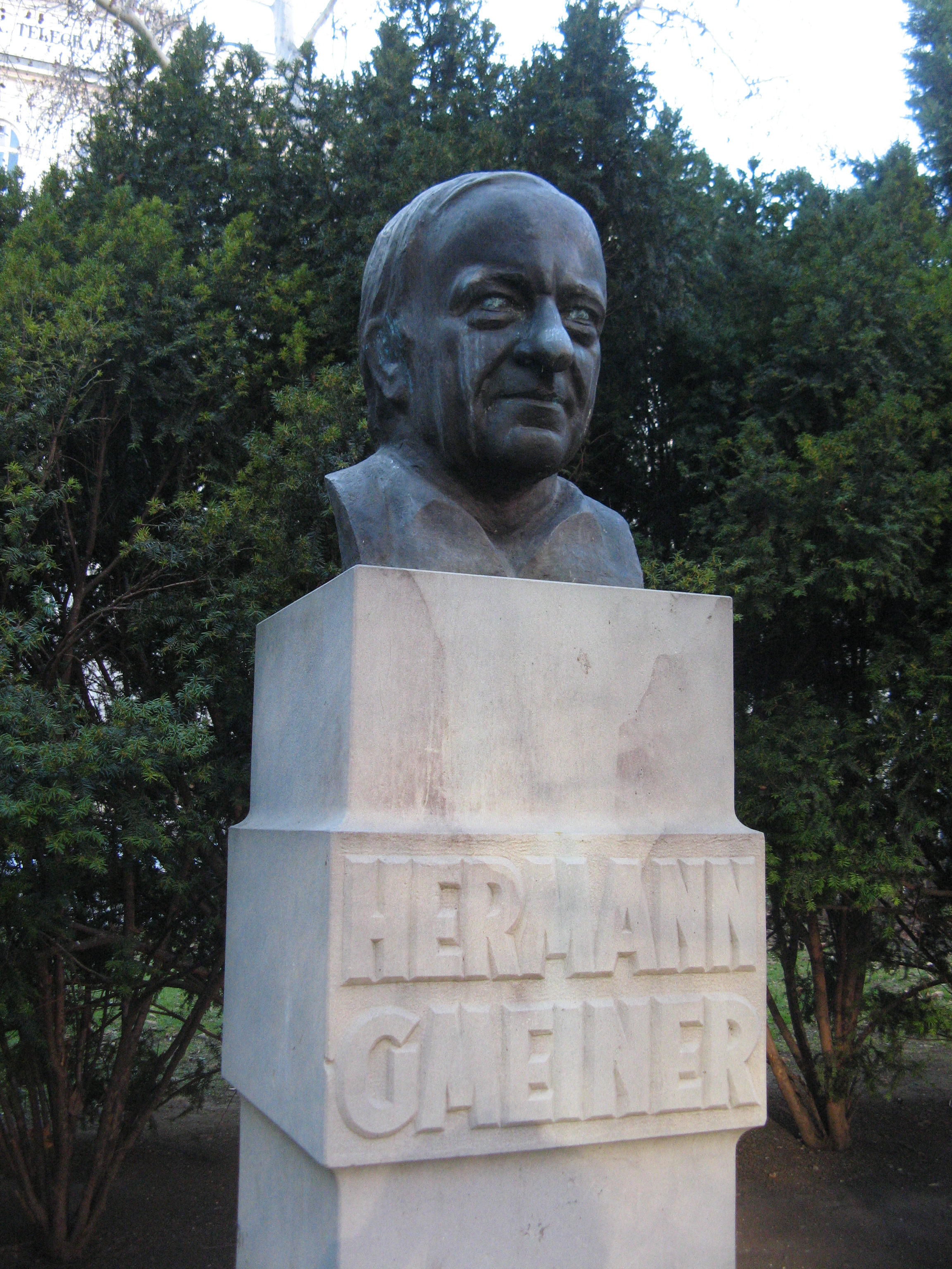 Hermann-Gmeiner-Büste (1993) von Paul Peschke, Hermann-Gmeiner-Park, Wien-Innere Stadt